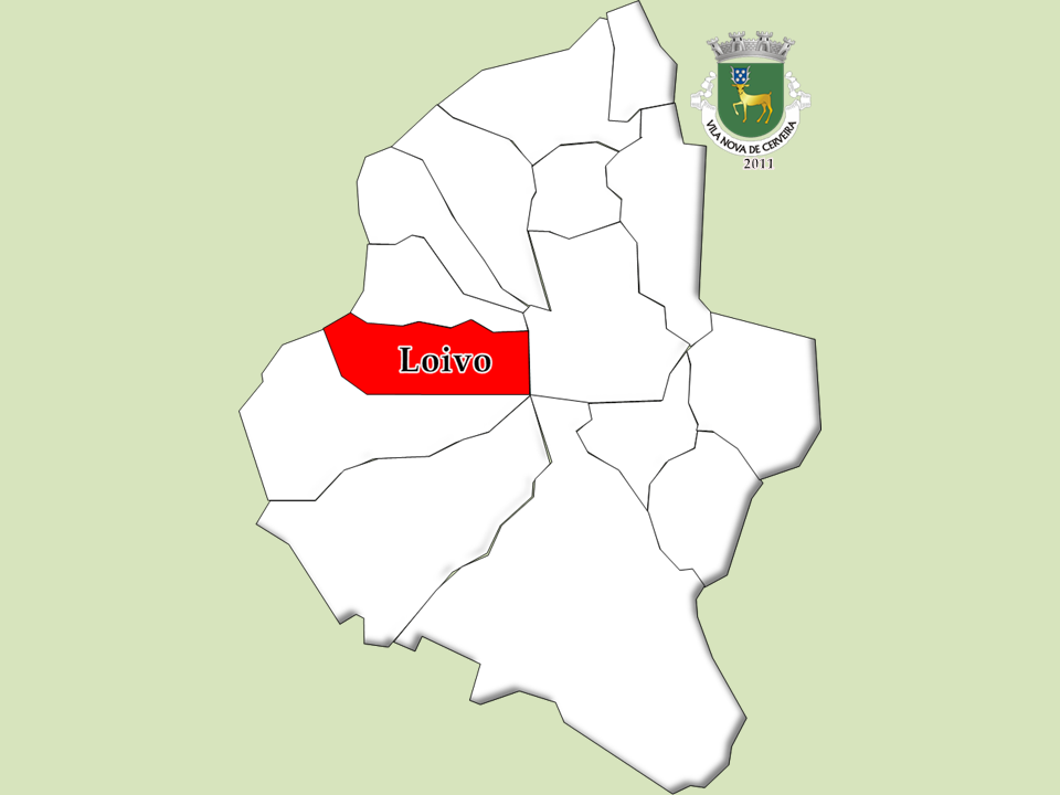 Censos 1864/2011